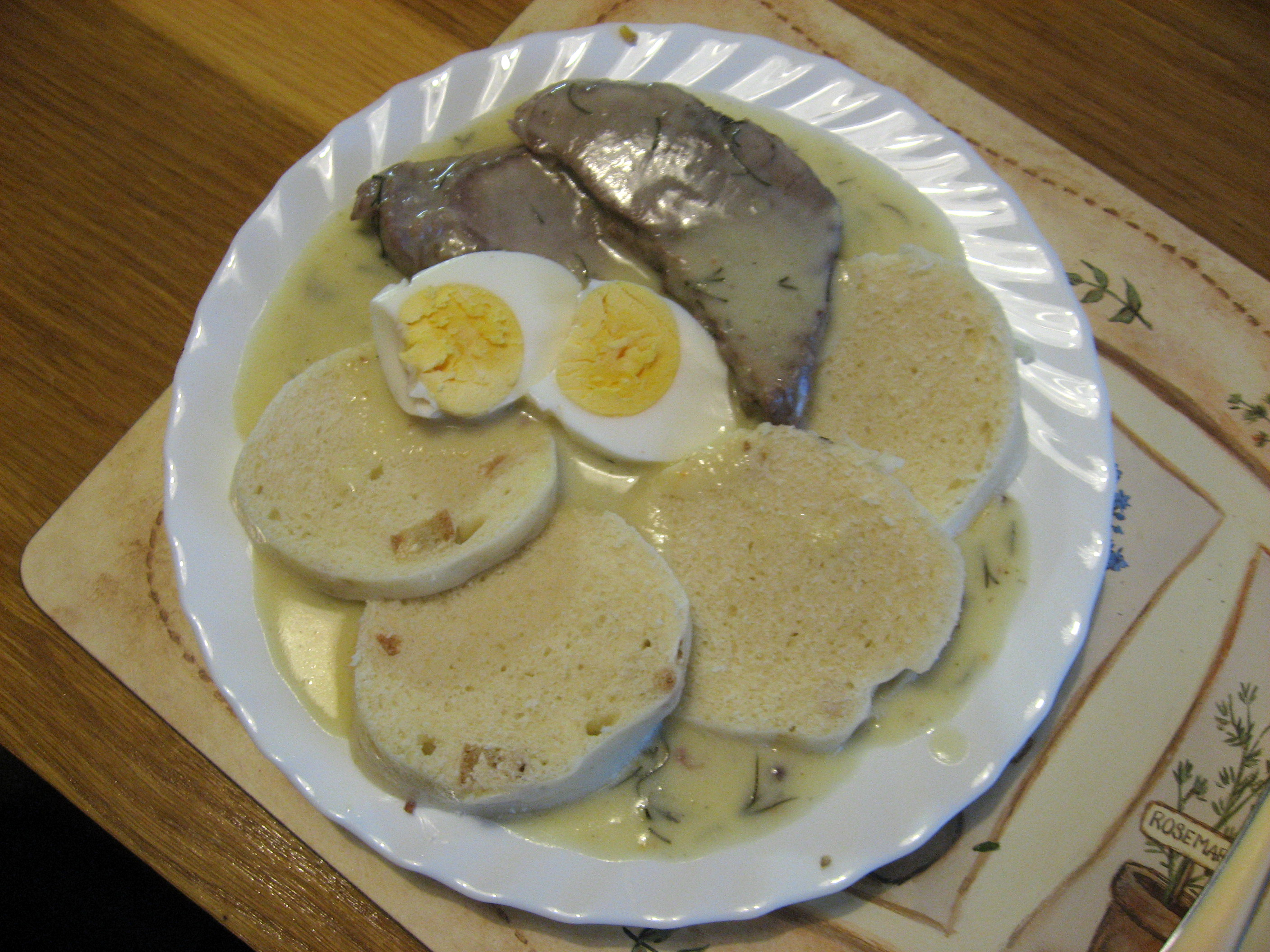 Koprová omáčka, hovězí plátek, vajíčko na tvrdo